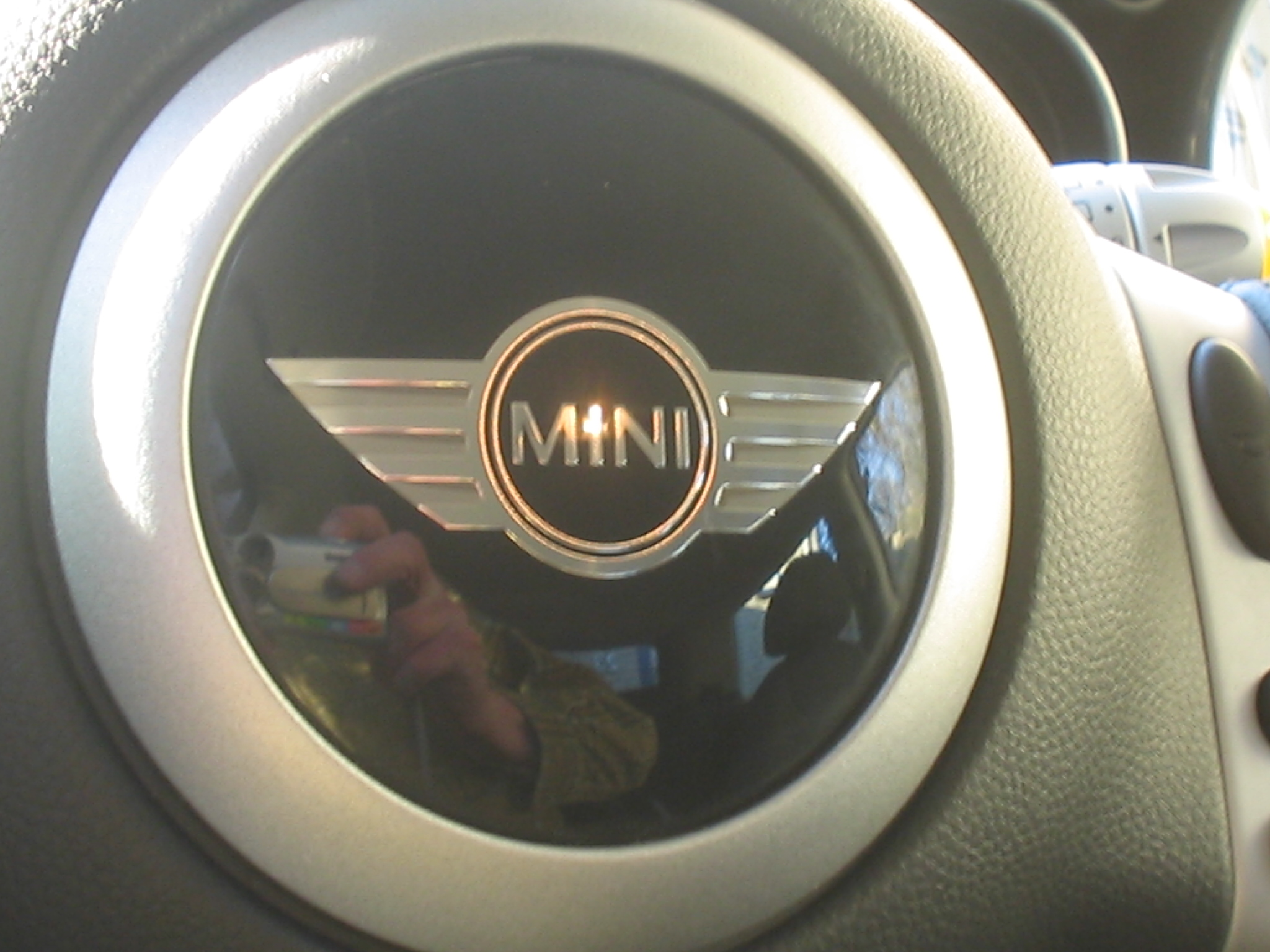 Mini logo op stuur, dec. 2005